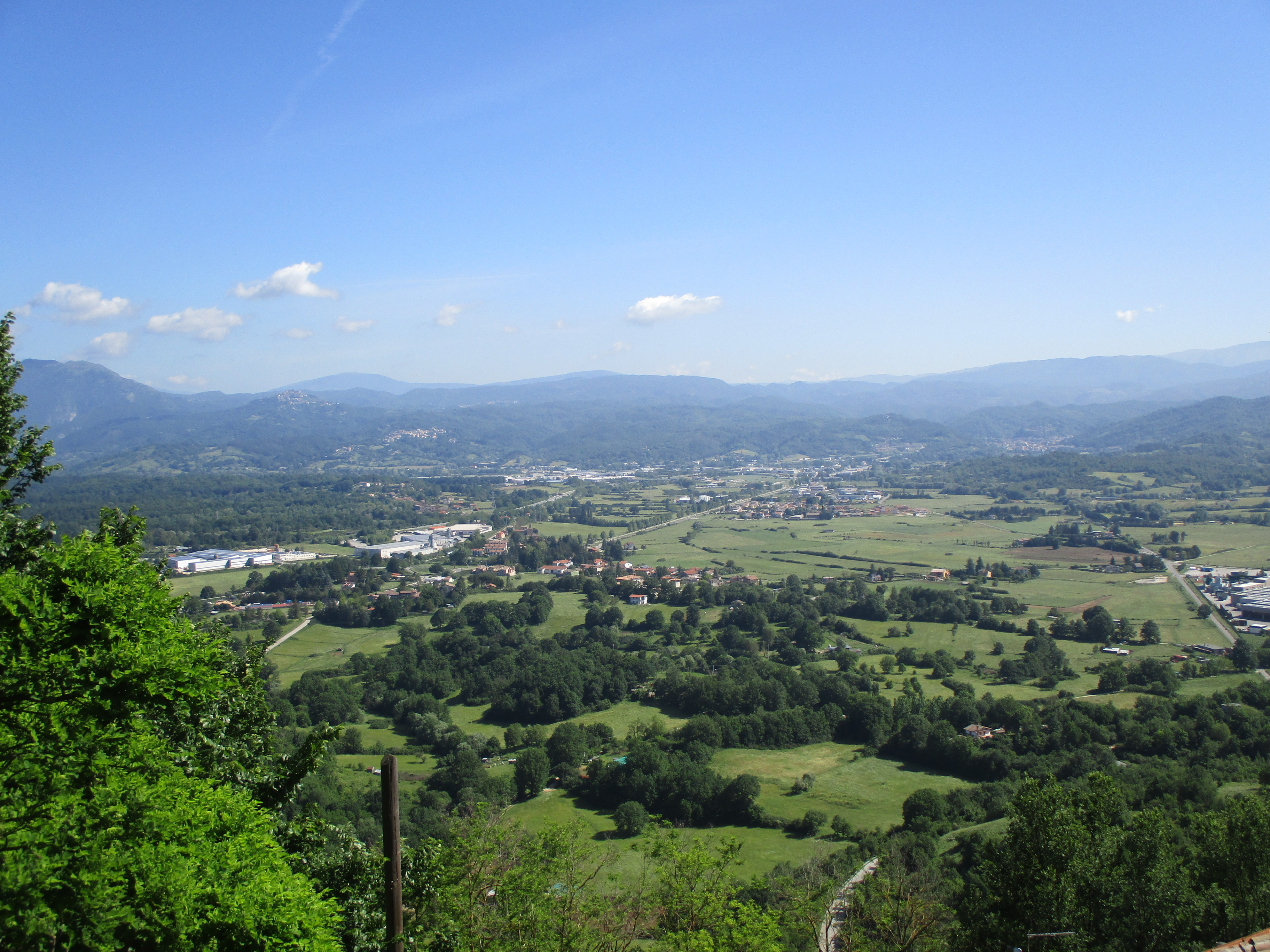 Veduta di Civita di Oricola